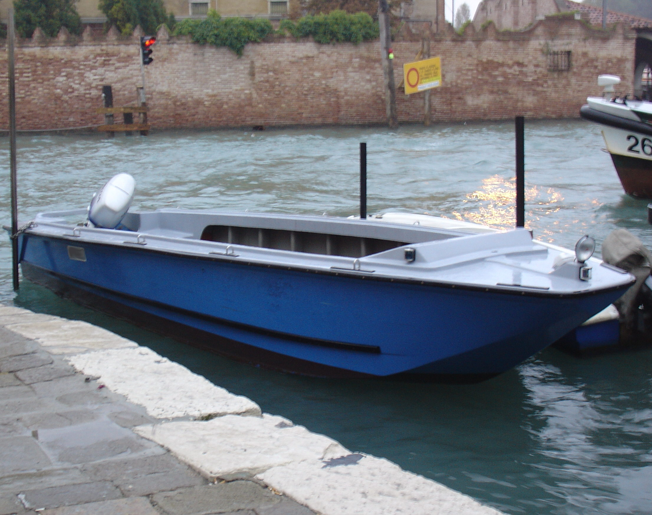 Sàtara - Imbarcazione tipica veneziana